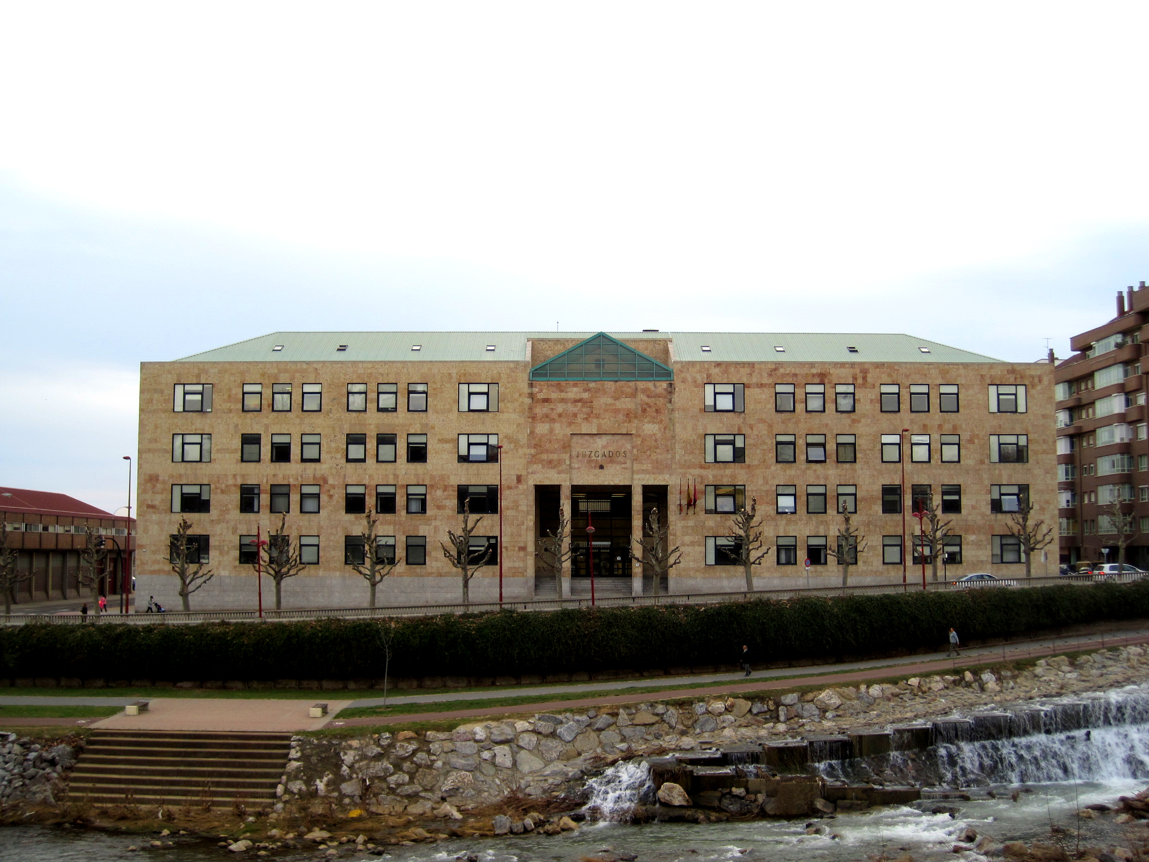 Edificio de los juzgados en León (España).